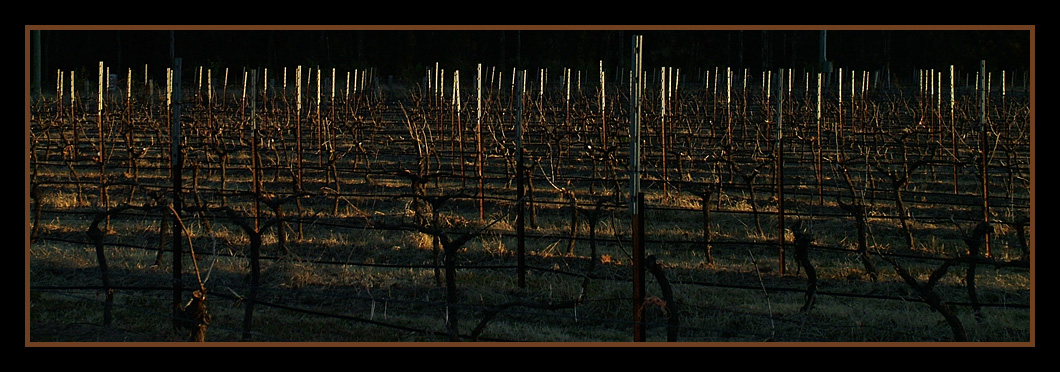 Sunset over a Pokolbin vineyard